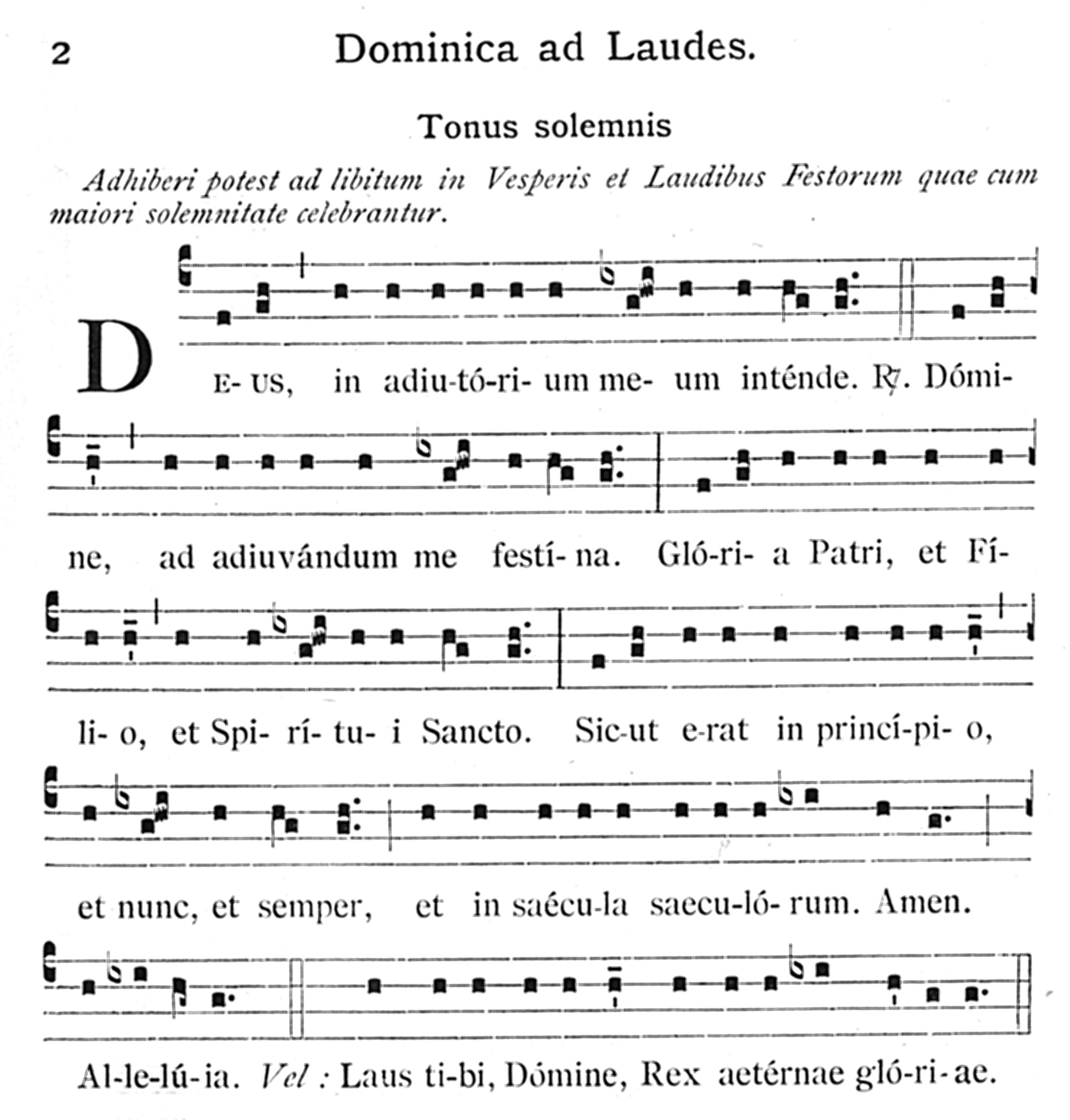 Deus, in adiutorium meum intende Eröffnungsversikel zu den Horen des Stundengebets Quelle: Antiphonale Romano-Seraphicum pro horis diurnis, Desclèe, Parisi, Tornacoi, Romae 1928, S. 2